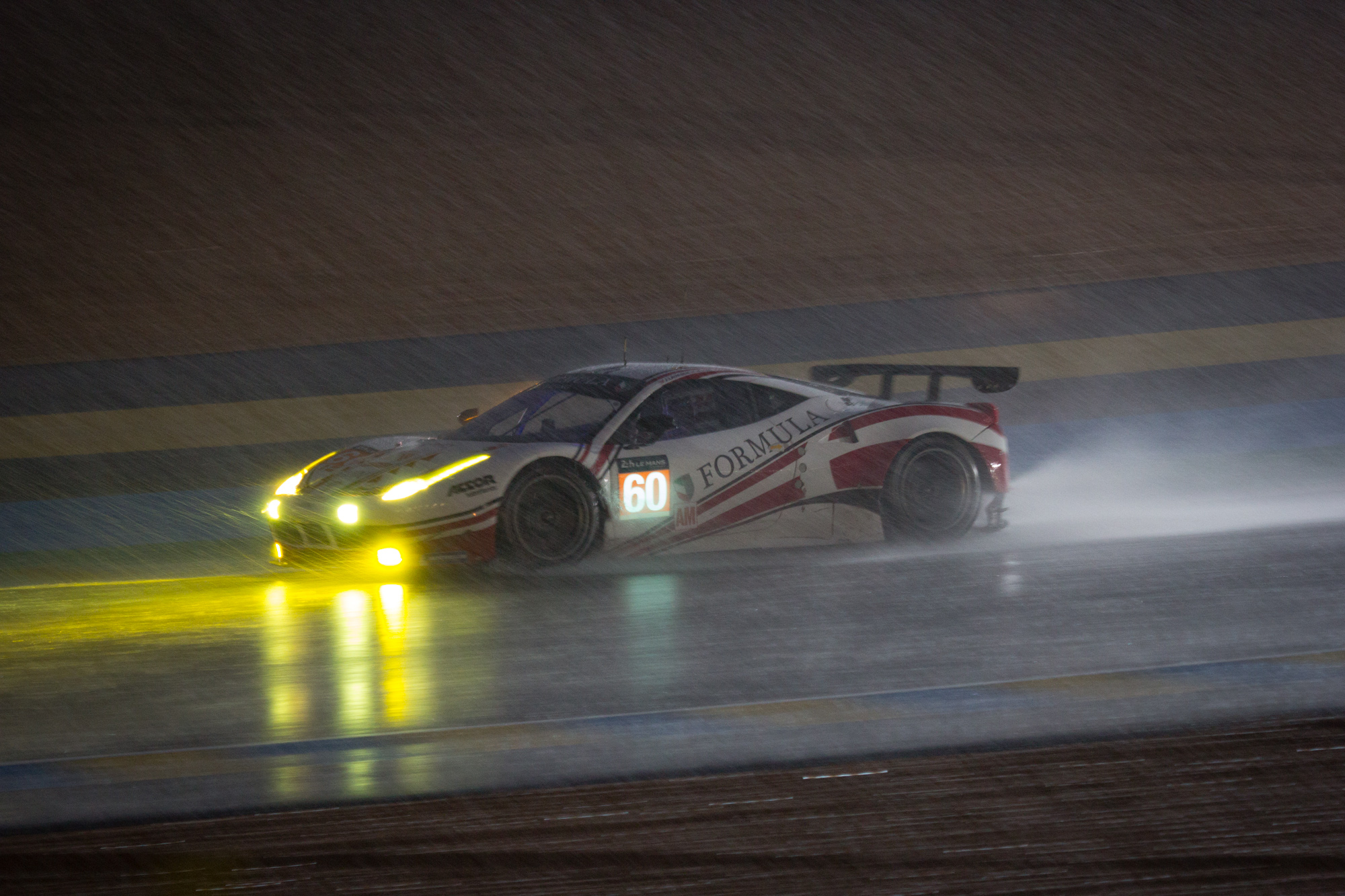 Drivers: Johnny Laursen, Mikkel Mac Jensen, Christina Nielsen